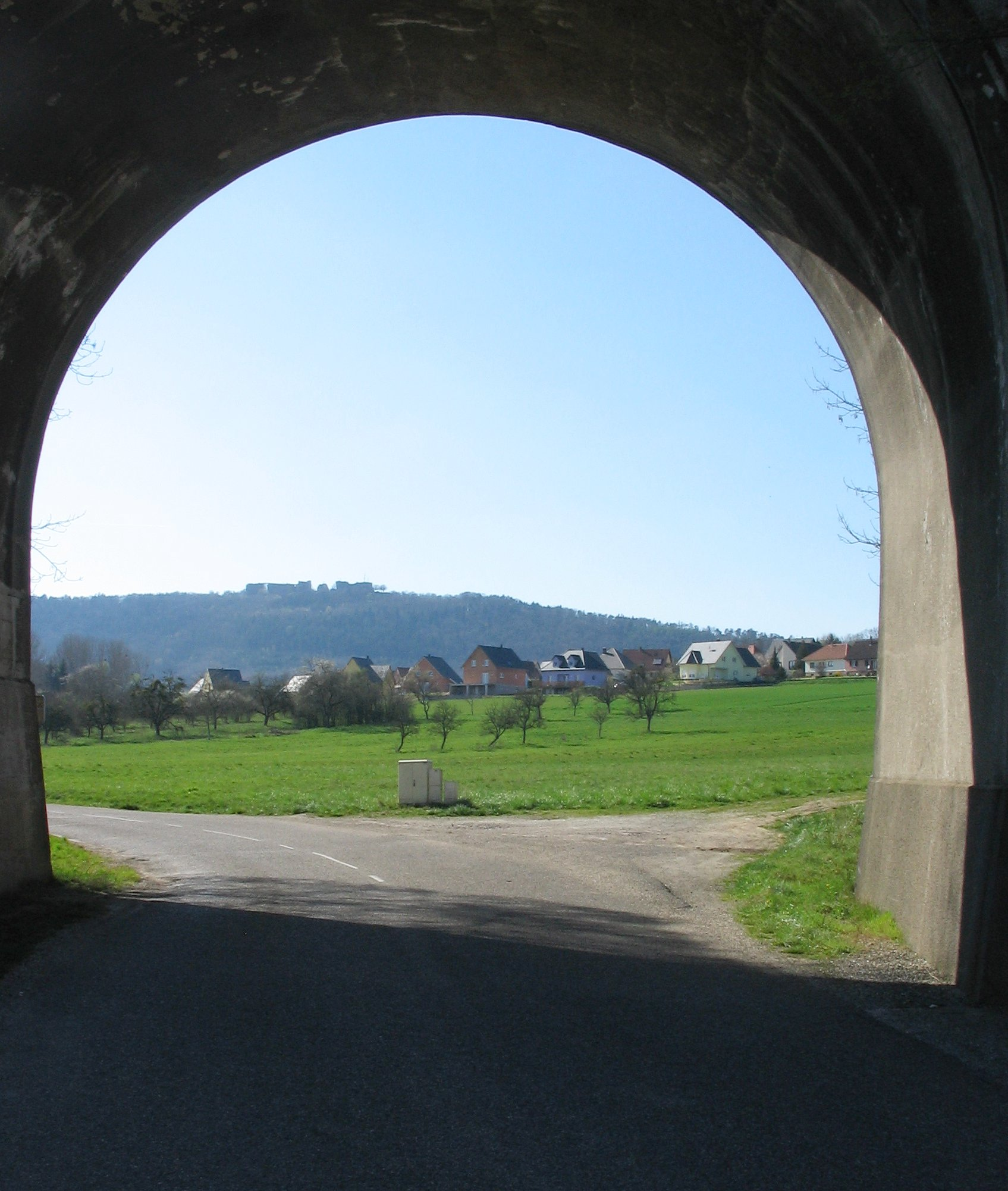 le château du Haut-Barr sur la crête des Vosges et le village de Gottenhouse vus du viaduc d'Otterswiller (Bas-Rhin).